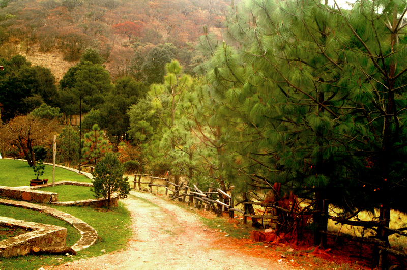 Sierra Fría, Aguascalientes, México